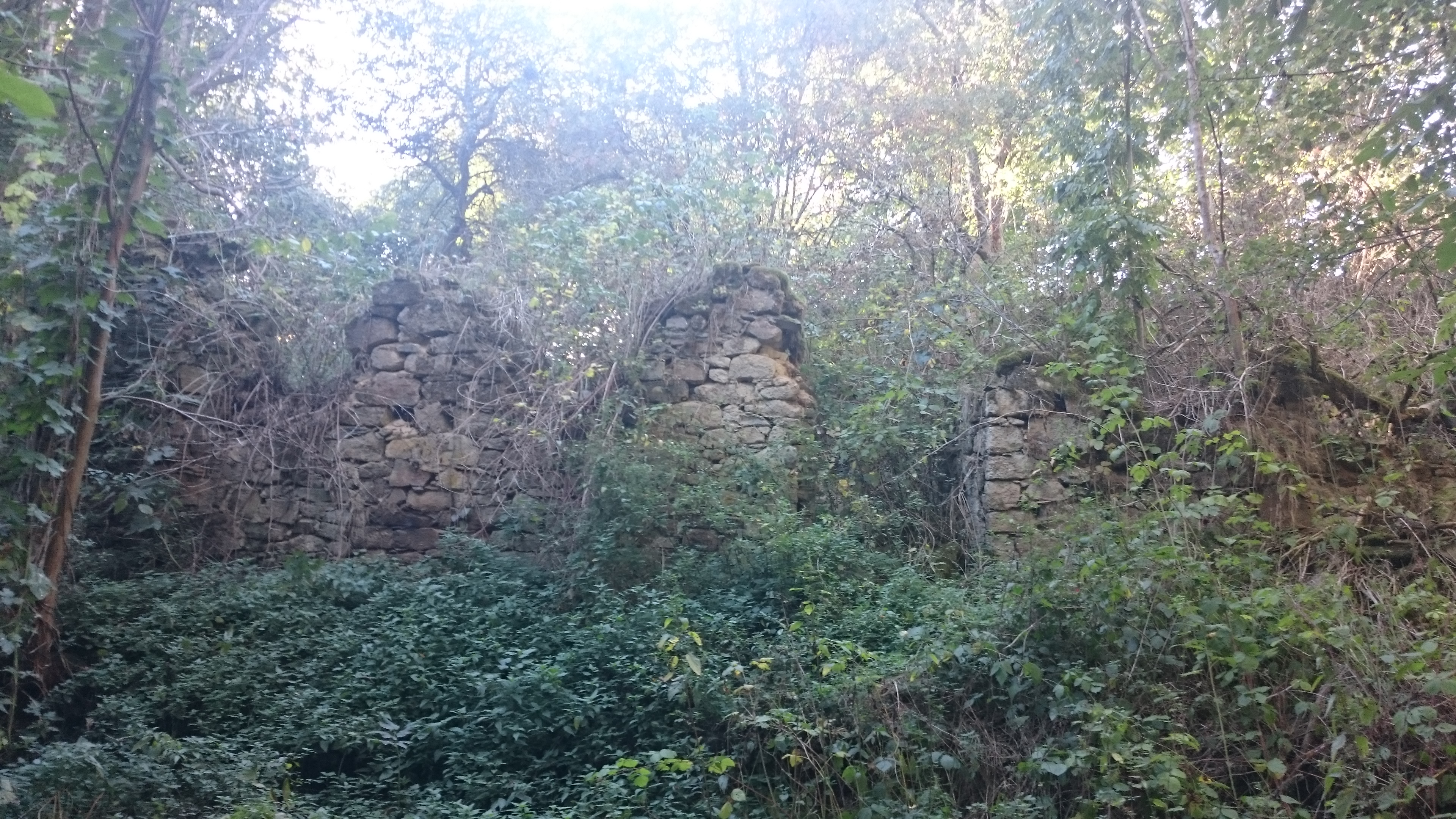 Ruiny v Račíně. Okres Plzeň-sever, Česká republika.